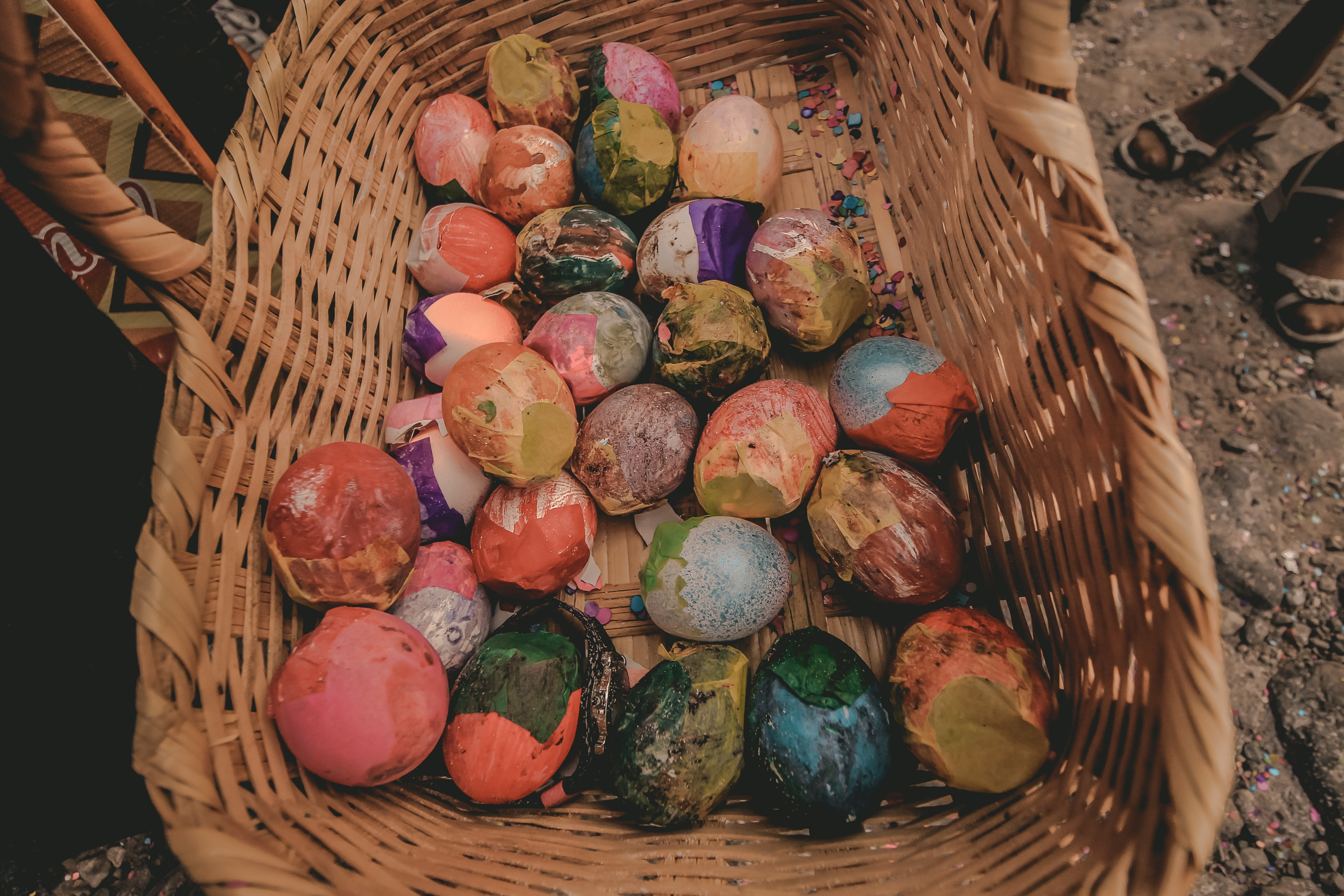 Se muestra la canasta de una señora llena con cascarones de huevos pintados de colores, llenos de confeti, elaborados por manos de niños del pueblo y se utilizan para celebrar las tradiciones más importantes de Ajijic Jalisco México This photo has been taken in the country: Mexico